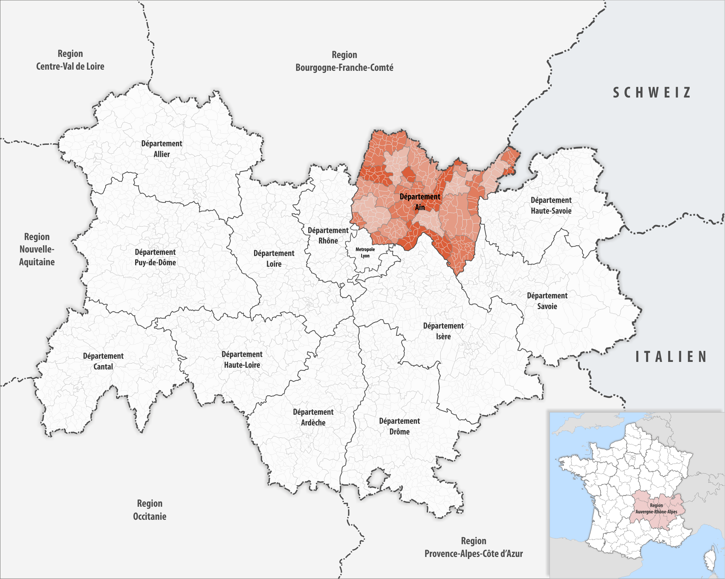 Lage des Departements Ain